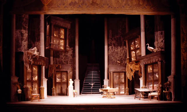 Decorado de teatro de la obra "El Cementerio de los Pajaros" de Antonio Gala.